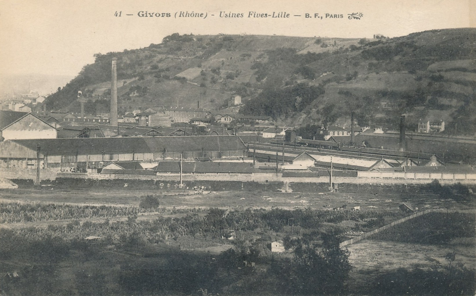 Usine Fives-Lille de Givors. Archives municipales de Givors, cote 5Fi 1907